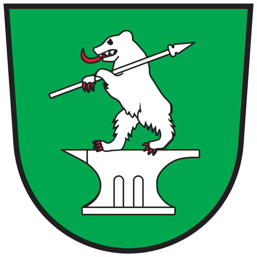 Wappen von Freistritz im Rosental